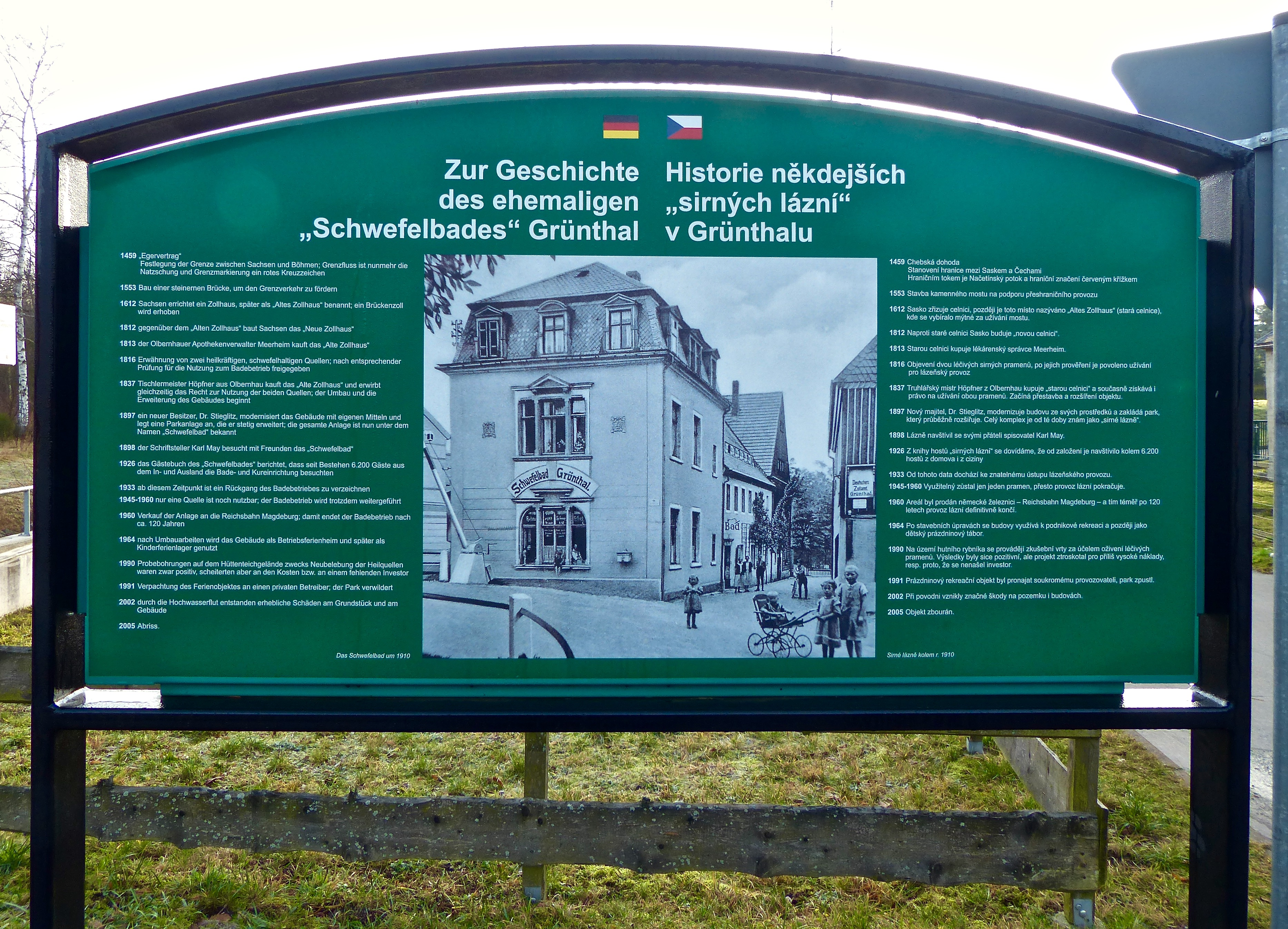 Hinweistafel: Geschichte des Schwefelbades Grünthal (April 2014 errichtet)